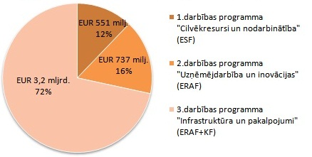 Finansējuma sadalījums starp darbības programmām no kopējā ES fondu finansējuma Latvijā EUR 4,53 mljrd. (LVL 3,18mljrd.)